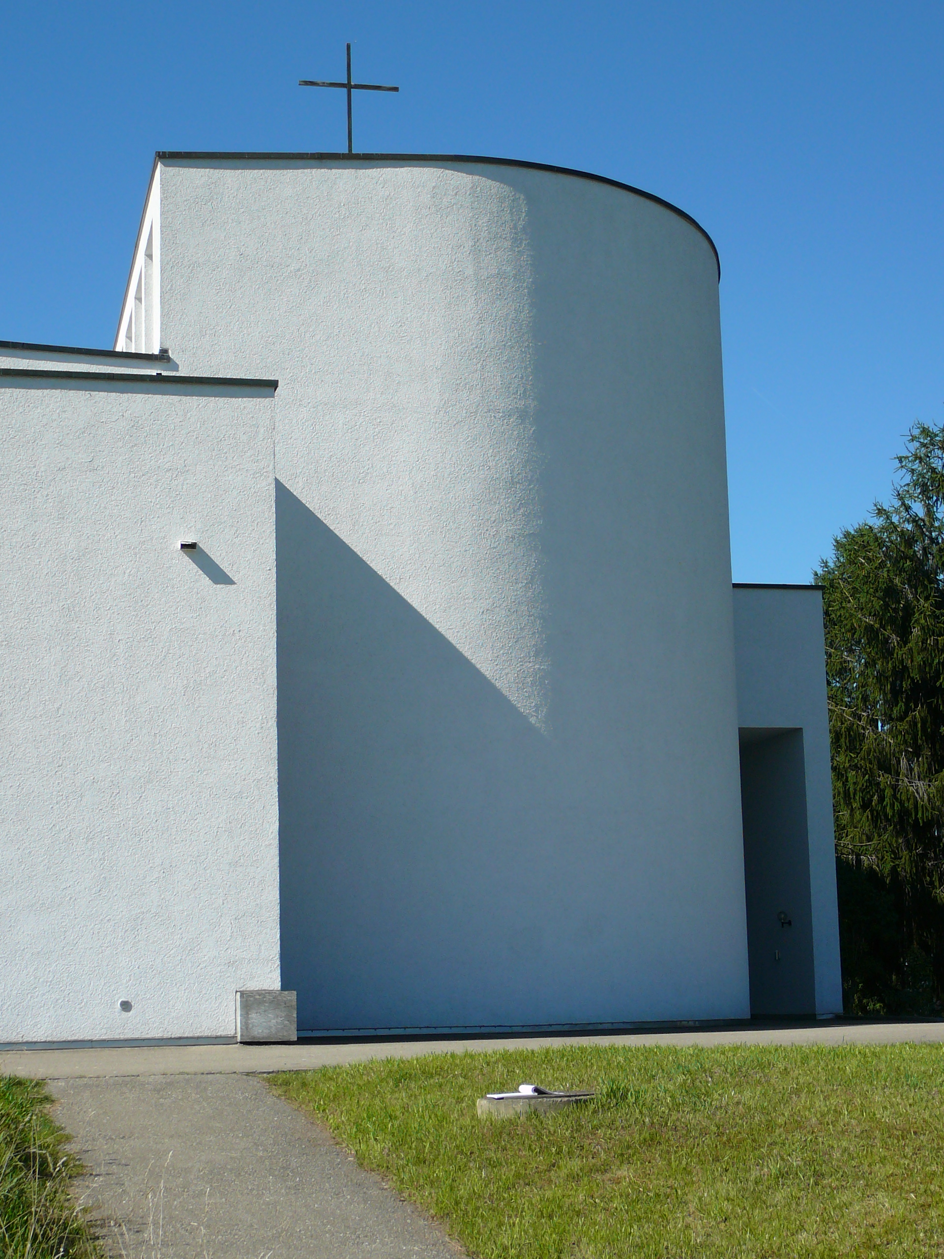 Römisch-katholische Pfarrkirche St. Petrus Rümlang, Eingang aussen